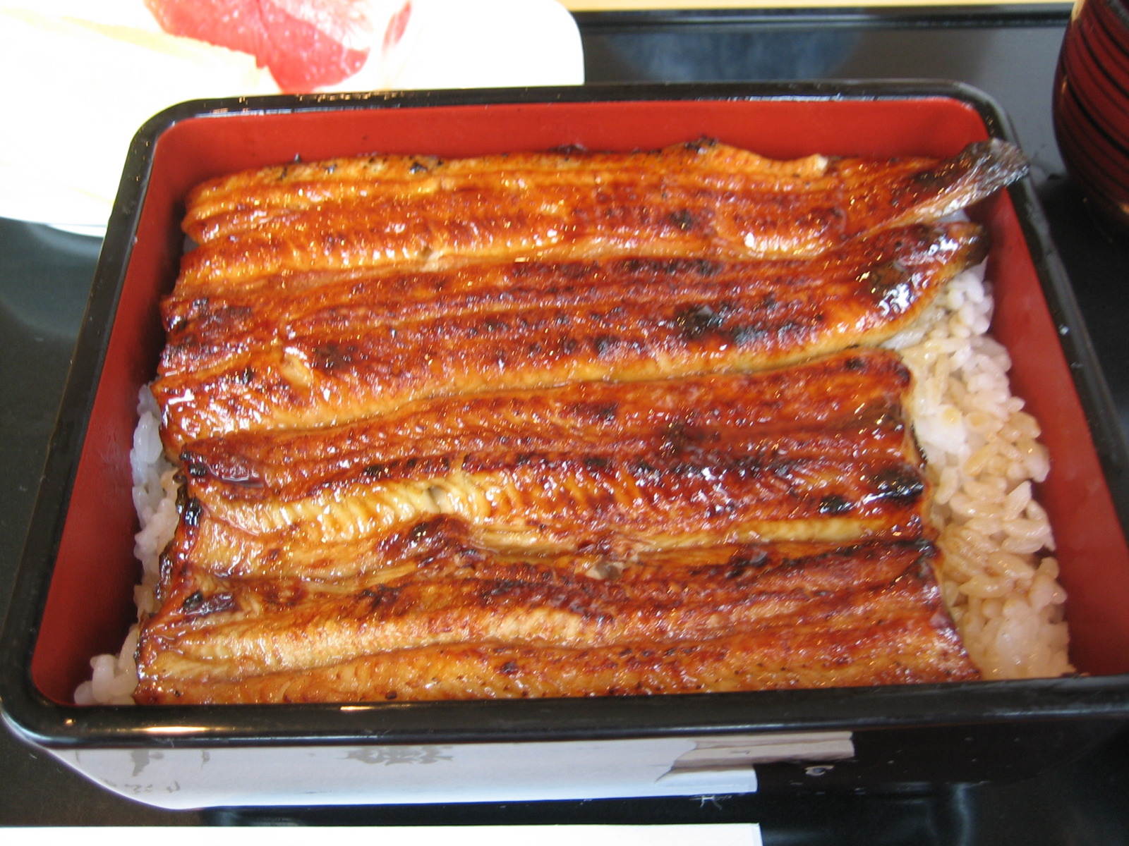 注文から30分かかります。前もって電話で予約しておけば待たずにすむそうです。Upon Opening the Lid...